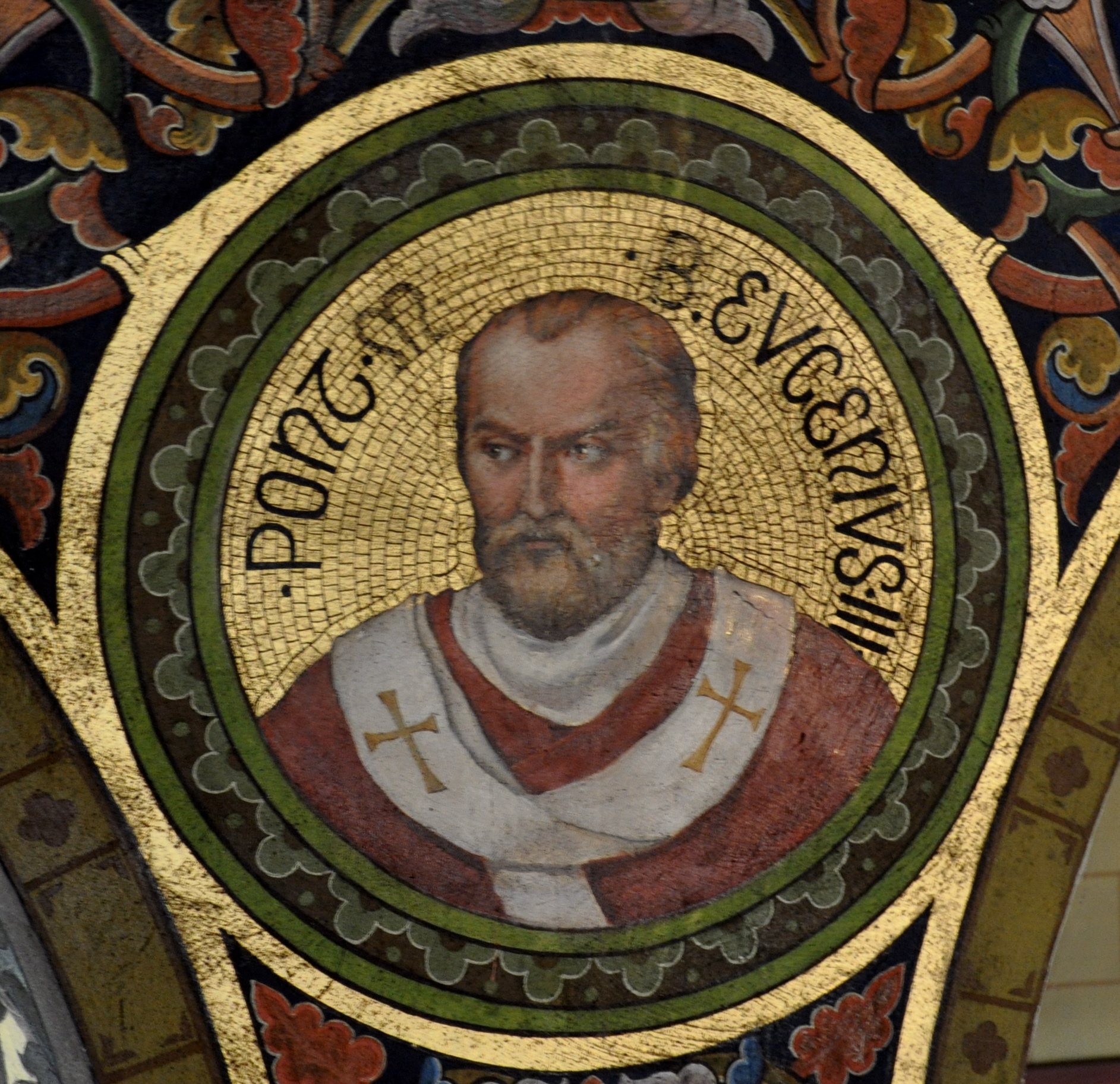 Kloster Mehrerau, Bregenz, Vorarlberg; Collegiumskapelle; Bildnisse von Päpsten (in den Arkadenzwickeln) und zugehörige Wappen; Eugen III., der erste Zisterzienserpapst